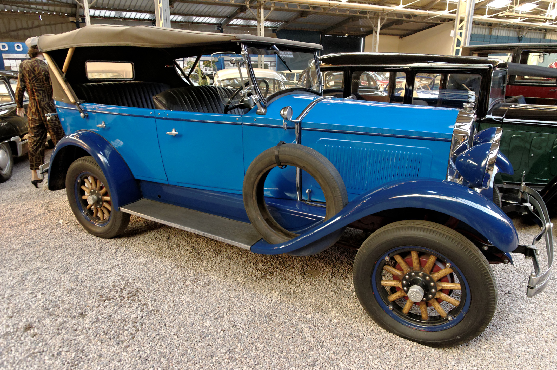 Willys Knight 70 A (1930), Torpédo 5 places, 6 cyl. sans soupapes, 2529 cm3, 14 cv fiscaux, vitesse max. 120km/h (Musée Automobile Reims Champagne, Reims, Marne, France)